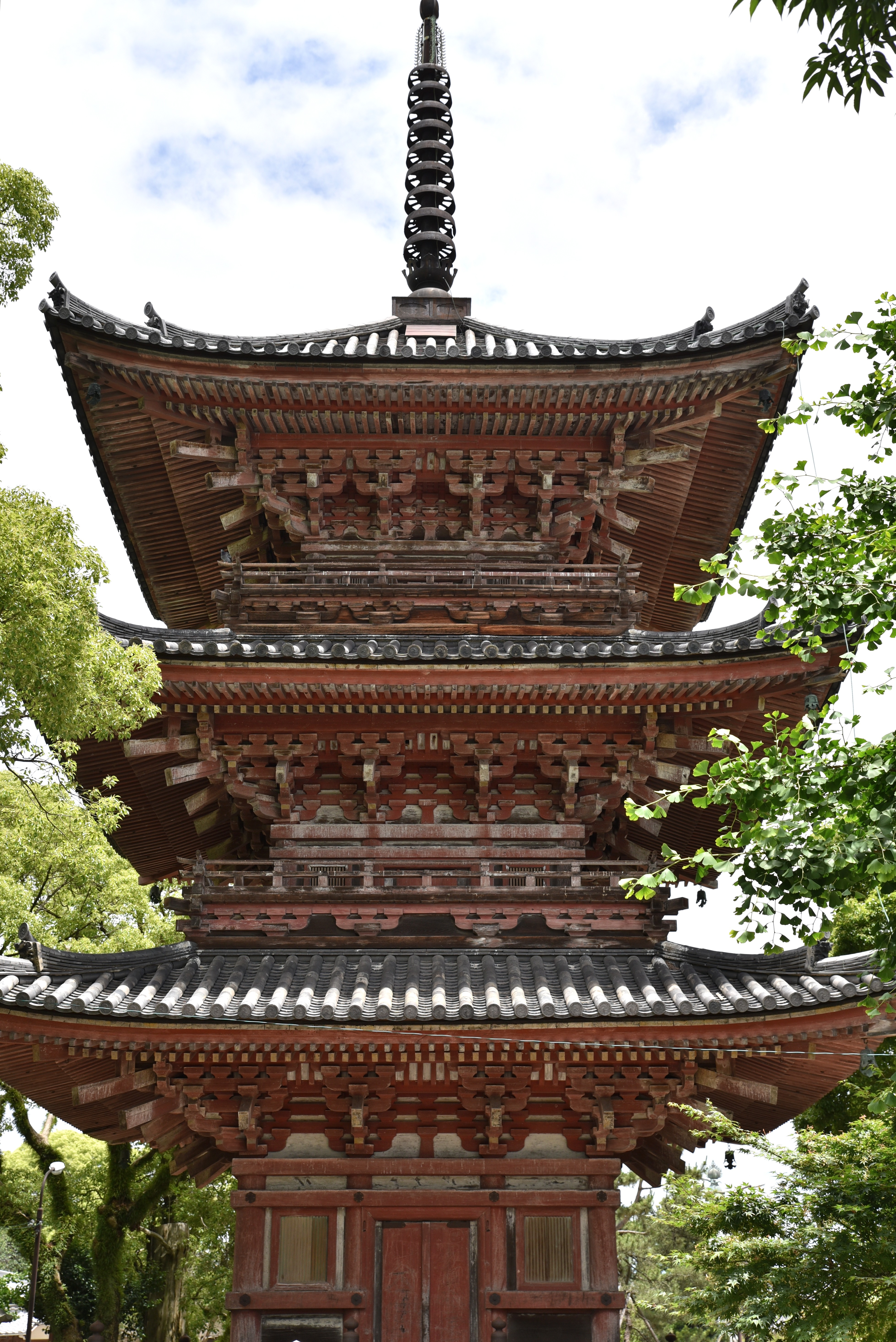 甚目寺三重塔 Nikon D750